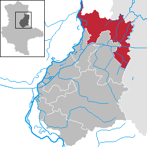 Jerichow im Landkreis Jerichower Land, Sachsen-Anhalt